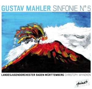 Cover der CD Gustav Mahler - Sinfonie No. 5 vom LJO BW